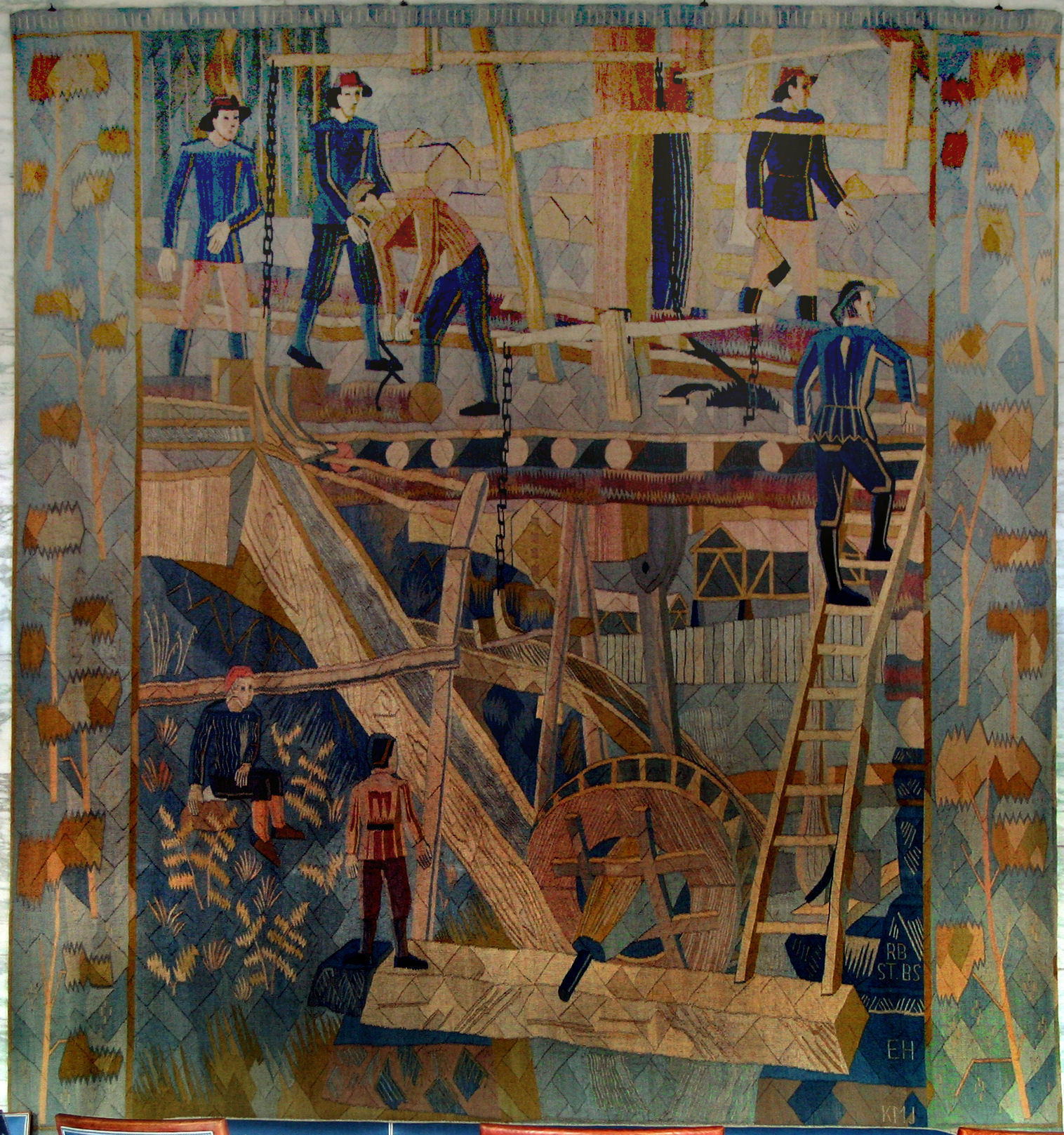 Tapistry, The Saw Mill, Oslo Town Hall, design by Kåre Jonsborg, woven by Else Halling 2006.